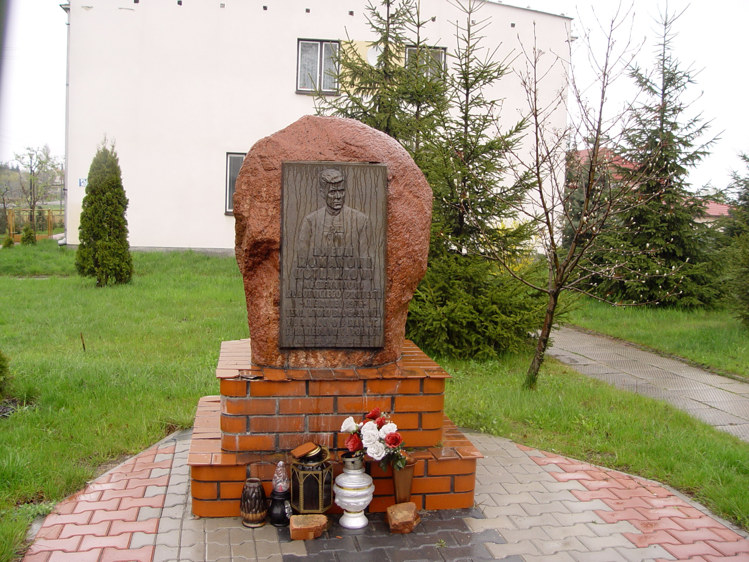 Koniemłoty - tablica ks. Romana Kotlarza w centrum miejscowości, vis-a-vis kościoła.